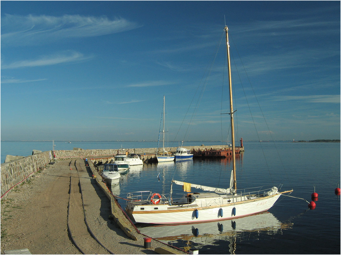 Naissaar